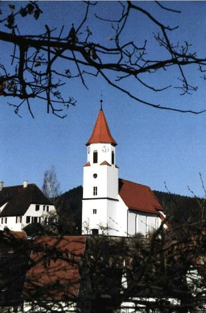 Pfarrhaus und Kirche von Frommern, Deutschland. Geburts- und Taufort des evangelisch-reformierten Pfarrers Heinrich Lang (1826-1876). - Aufnahme: Jakob Vetsch, 03.04.1995.